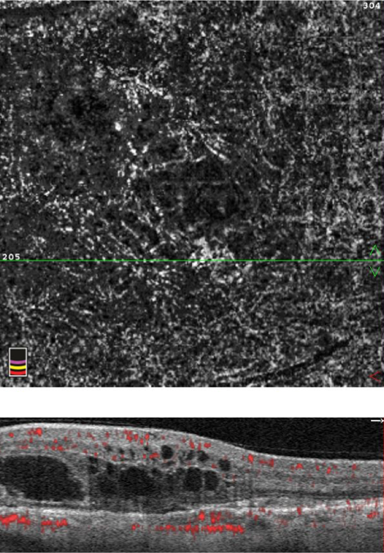 Fig 2. Degeneración macular asociada con la edad, exudativa.